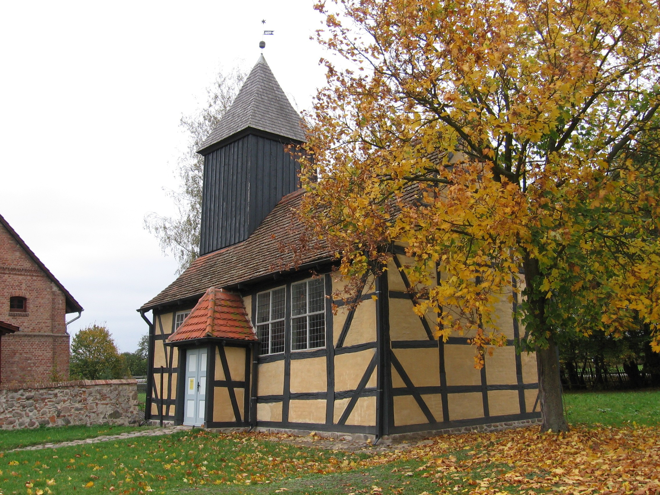 Kapelle in Klempenow, Ortsteil von Breest, Landkreis Demmin, Vorpommern